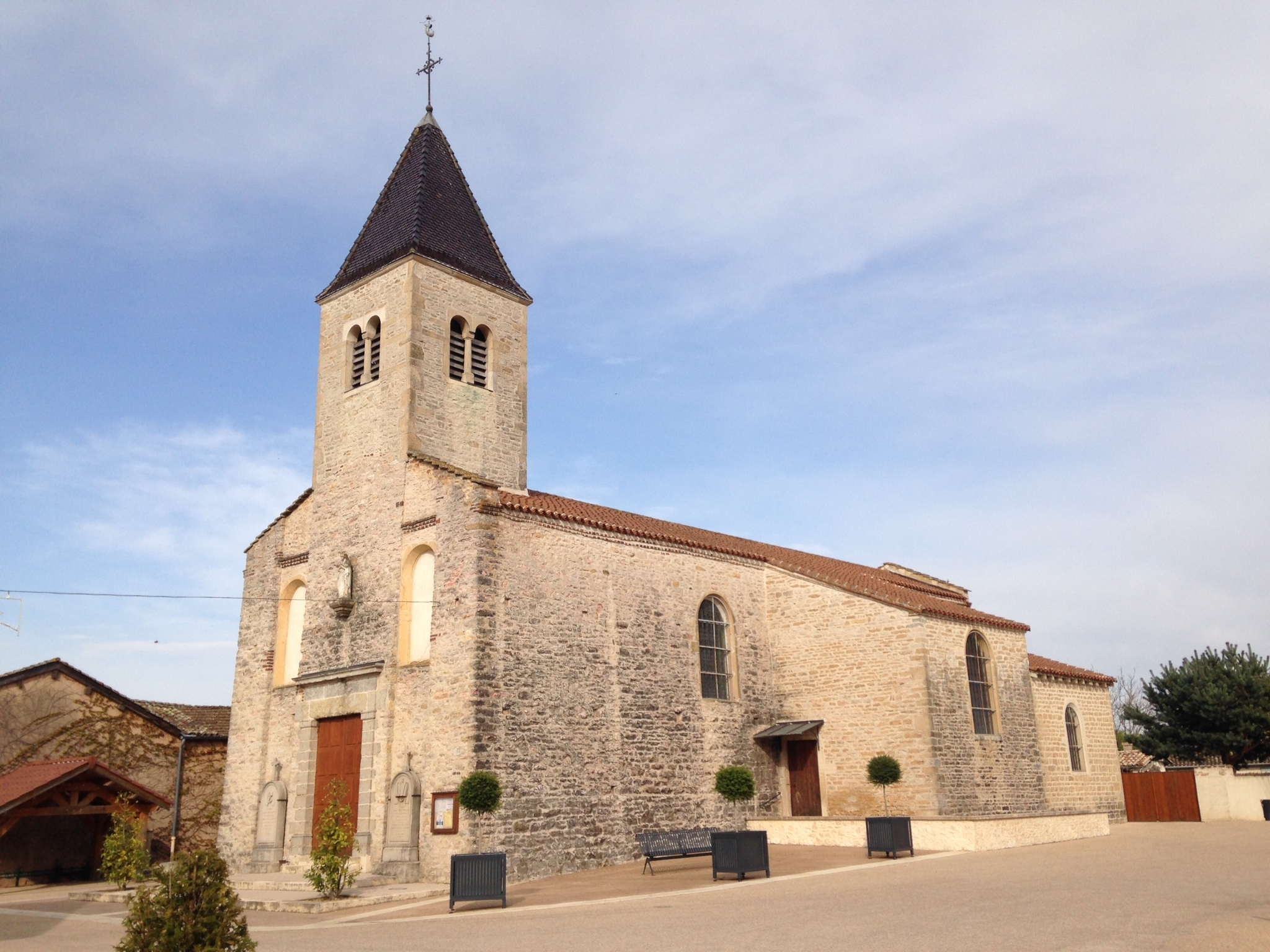 Église du village de Garnerans